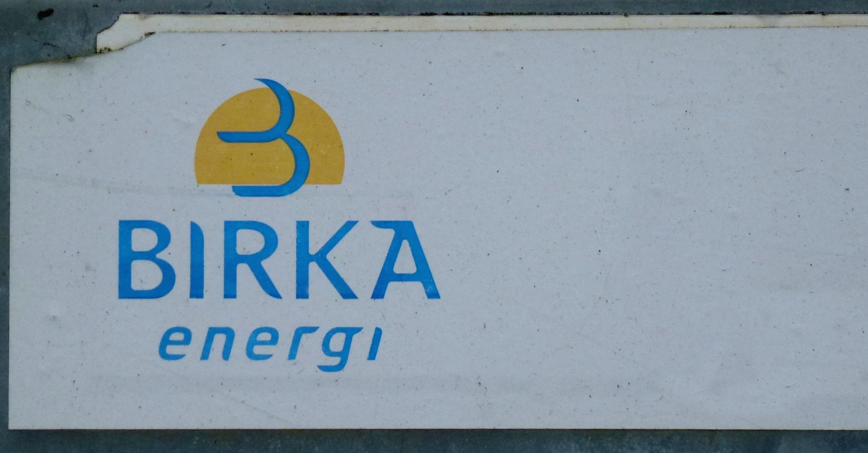 Birka Energi skylt på ett gammalt elskåp